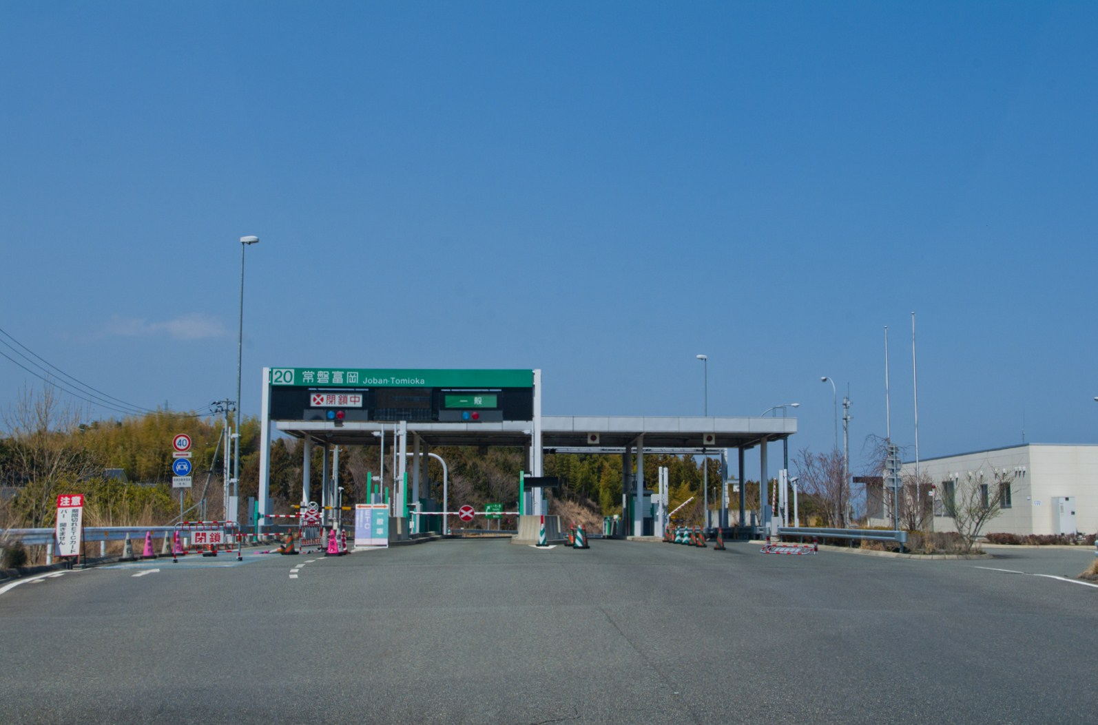 NEXCO東日本 常磐自動車道 常磐富岡インターチェンジ